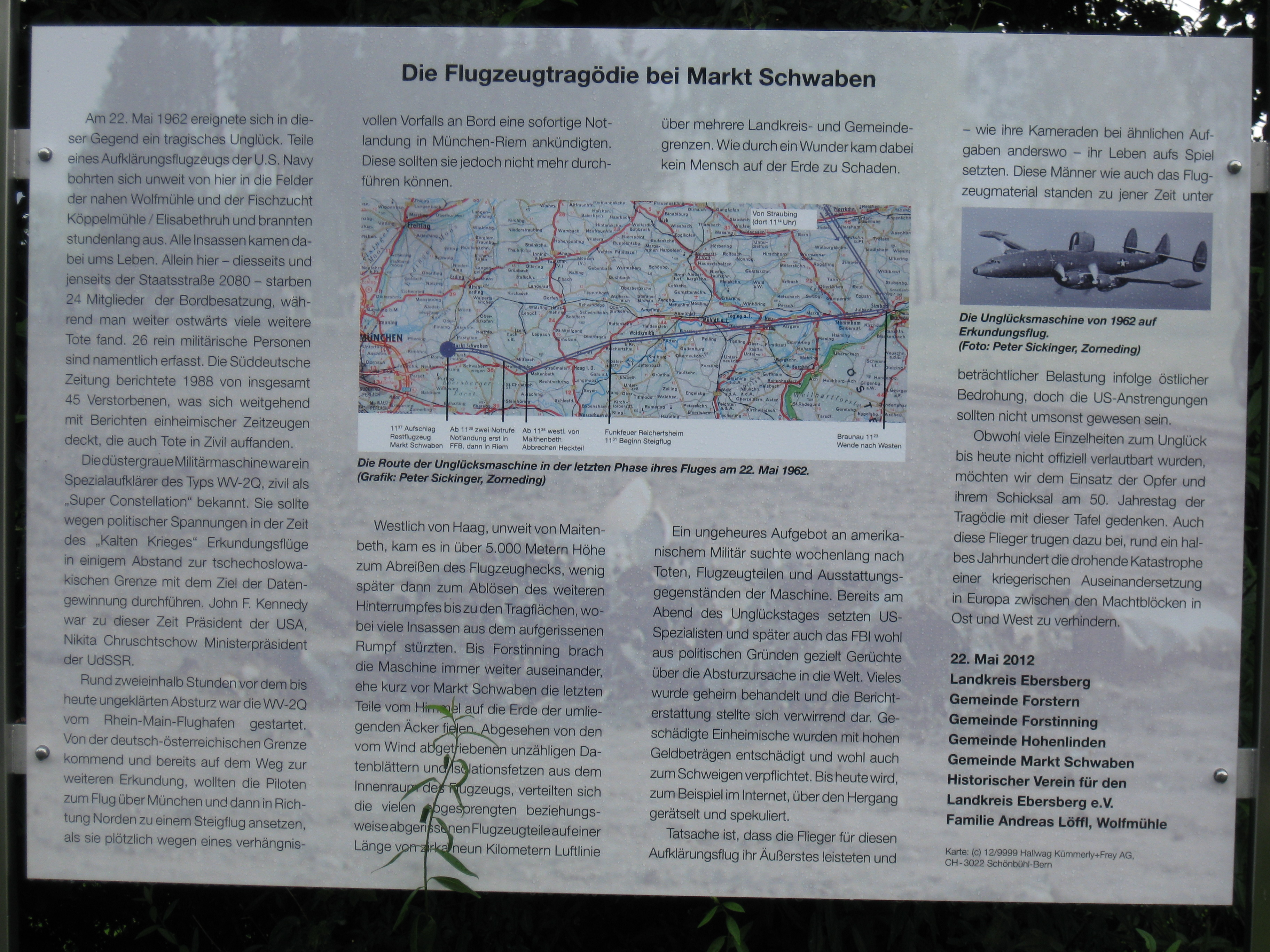 Wolfmühle b. Markt Schwaben, Informations- u. Gedenktafel an der Staatsstraße 2080 zum Absturz der LOCKHEED WV-2Q CONSTELLATION der US Navy am 22.05.1962.